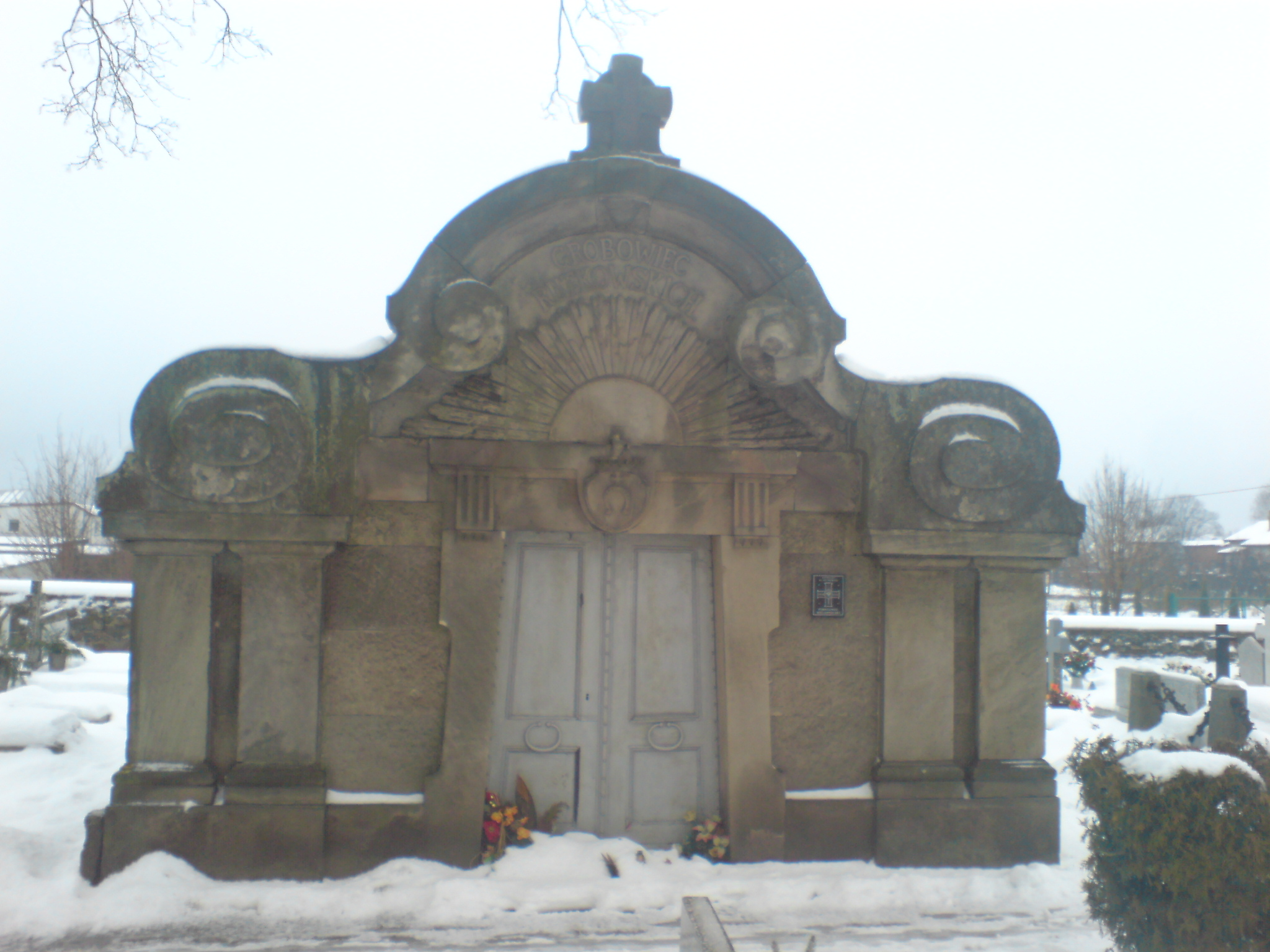 Grobowiec Rutkowiskich na cmentarzu w Sierakowie